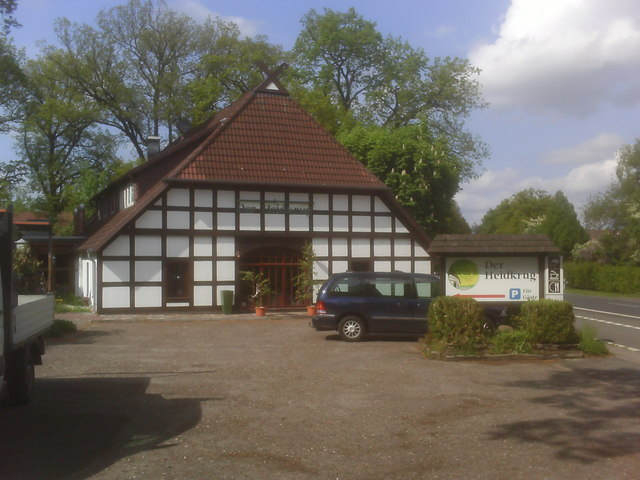 Kirchlinteln: Der Heidkrug, 11 km from Verden (aller), Deutschland (Zone 32). Der traditionsreichen Gastwirtschaft verdankt der Kirchlintelner Ortsteil Heidkrug seinen Namen.